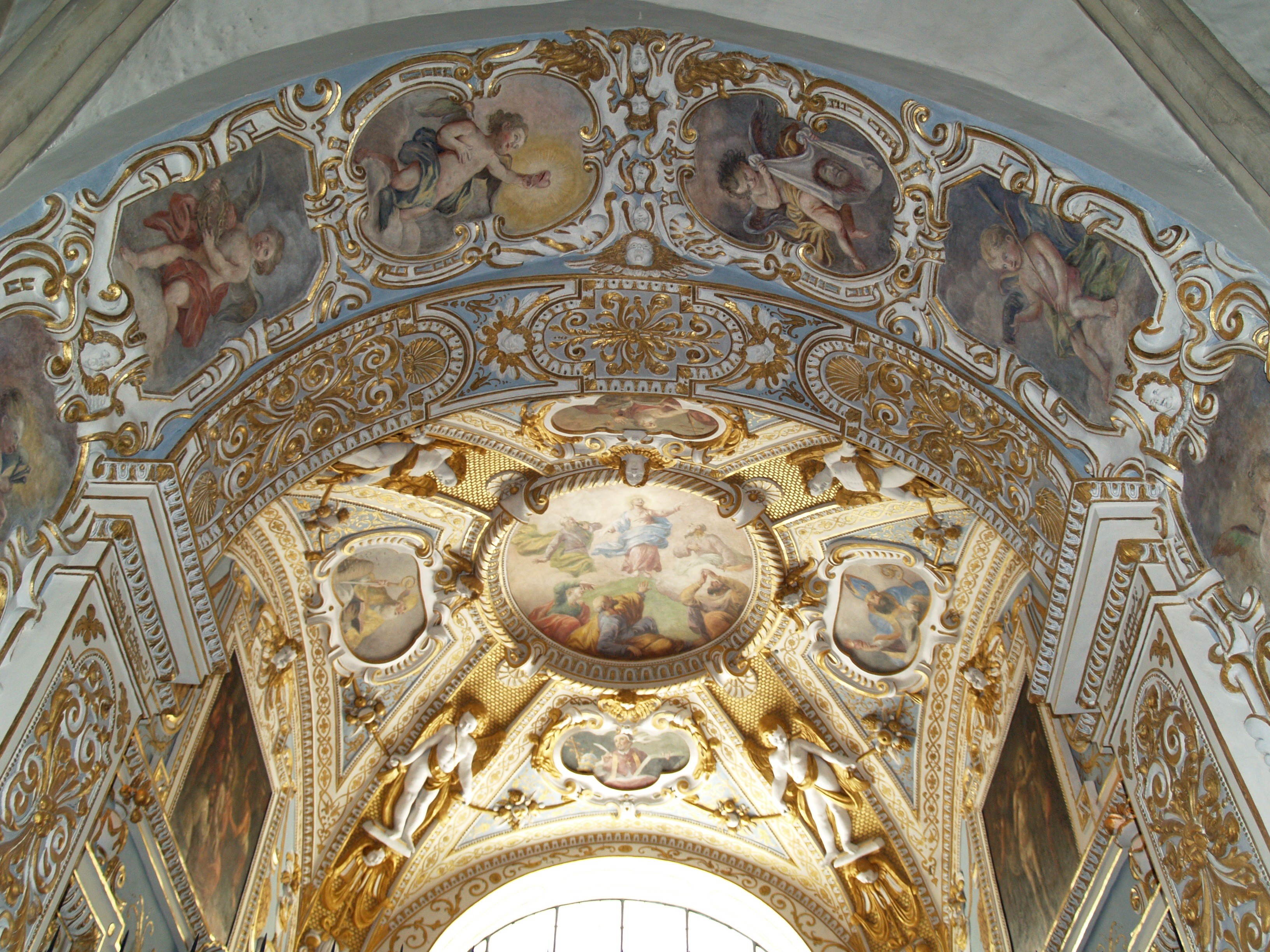 Viena. Iglesia de San Miguel. Bóveda de una de las capillas laterales. s. XVII.